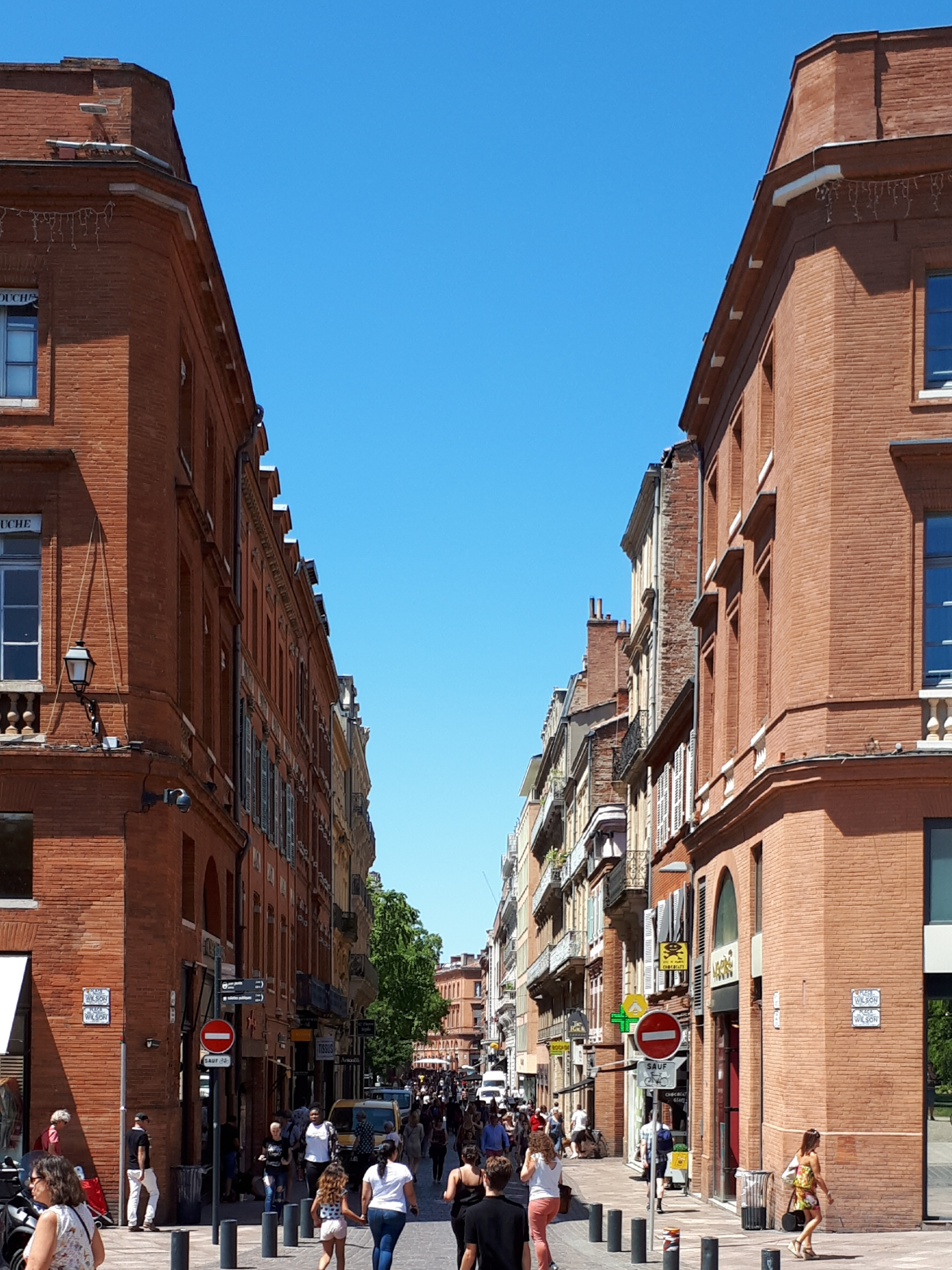 La rue Lafayette vue depuis la place Wilson (Toulouse).